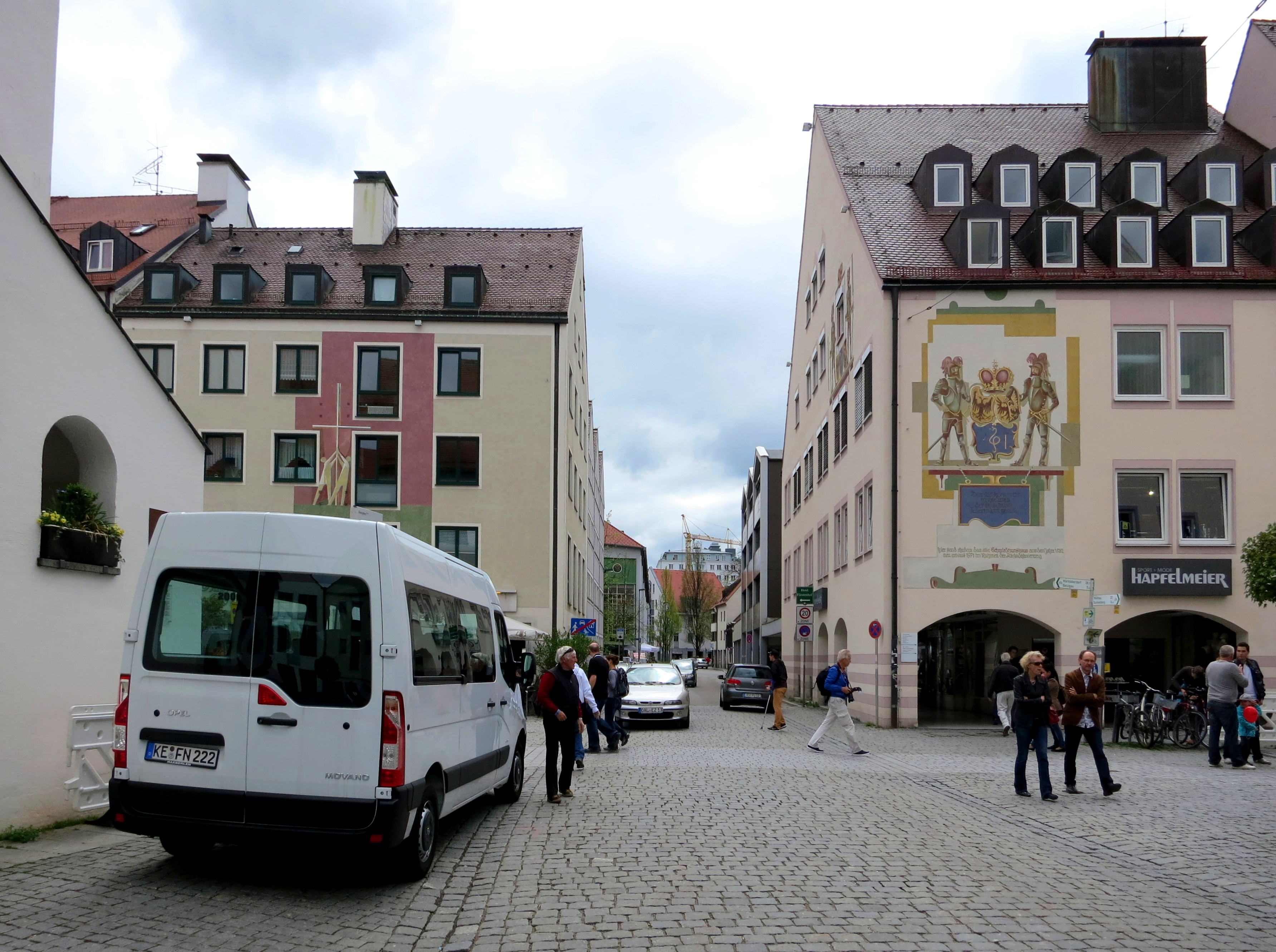 Das Foto zeigt den Altstadtdurchbruch in Kempten. Links der Nachfolgebau "Goldenes Kreuz" und rechts der Nachfolgebau "Schmiedezunft"